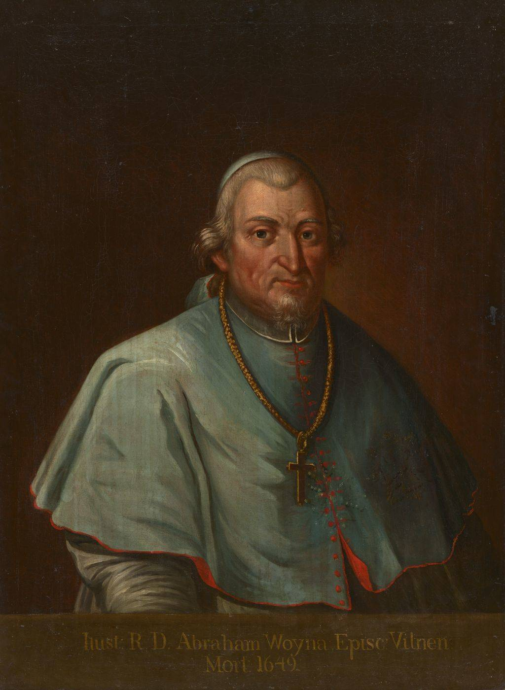 Беларуская (тарашкевіца): Партрэт Абрагама Войны (Abraham Vojna)